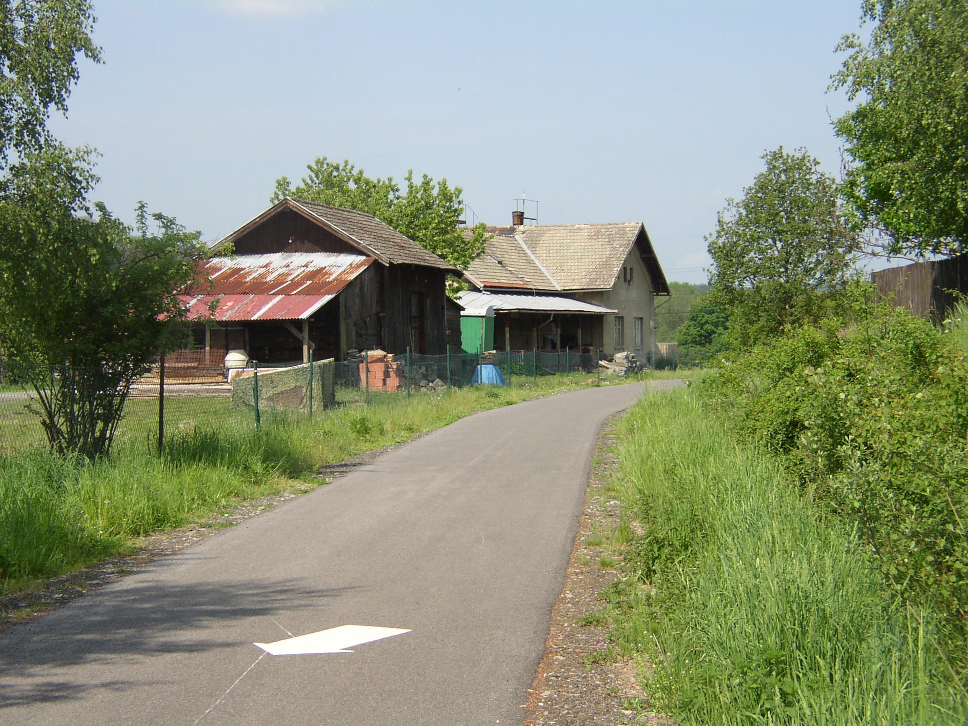 Bývalé nádraží v Horní Libchavě na cyklostezce Varhany.